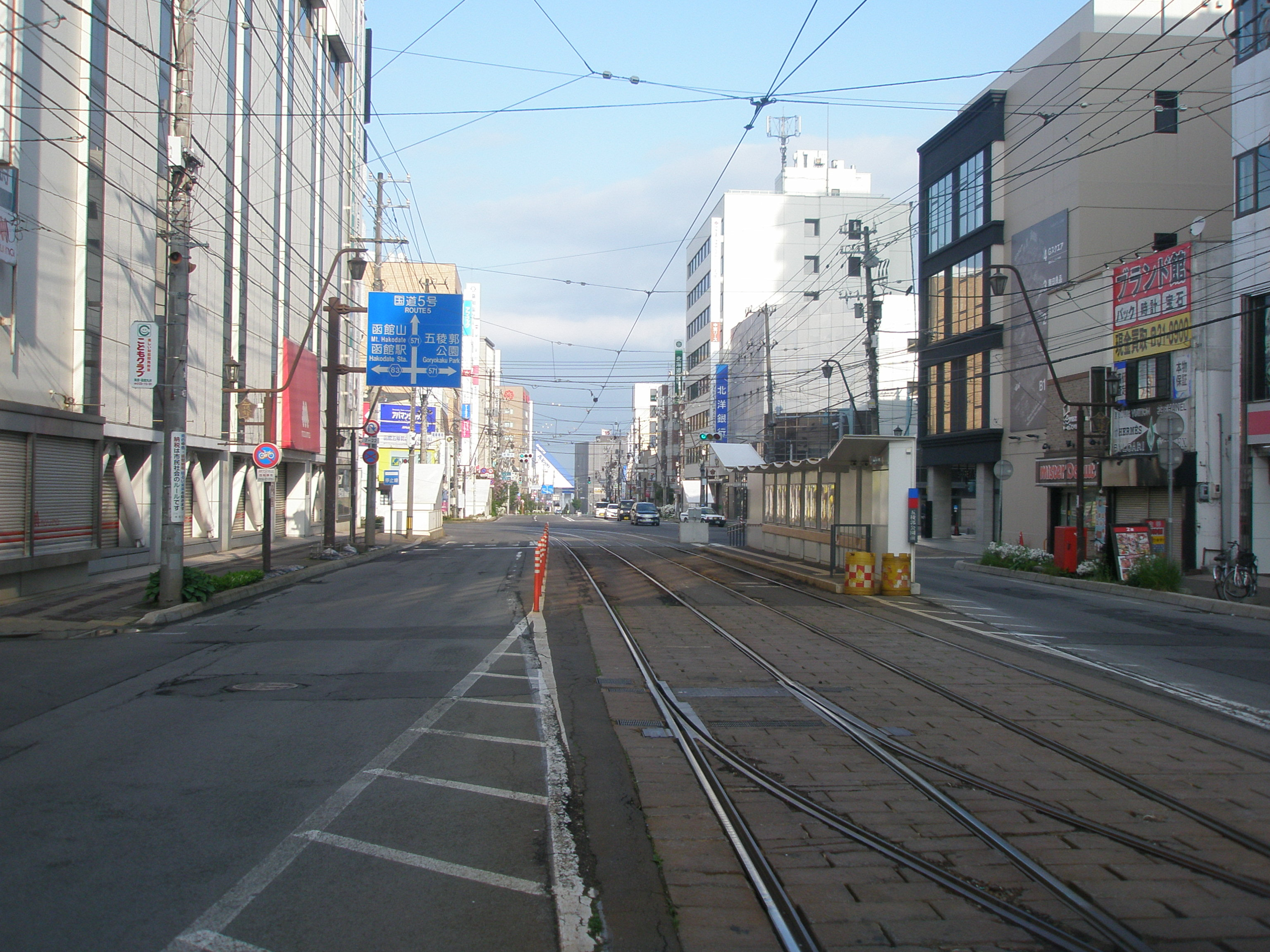 北海道道83号函館南茅部線・北海道道571号五稜郭公園線交点（終点側から、函館市電五稜郭公園前停留場から撮影）